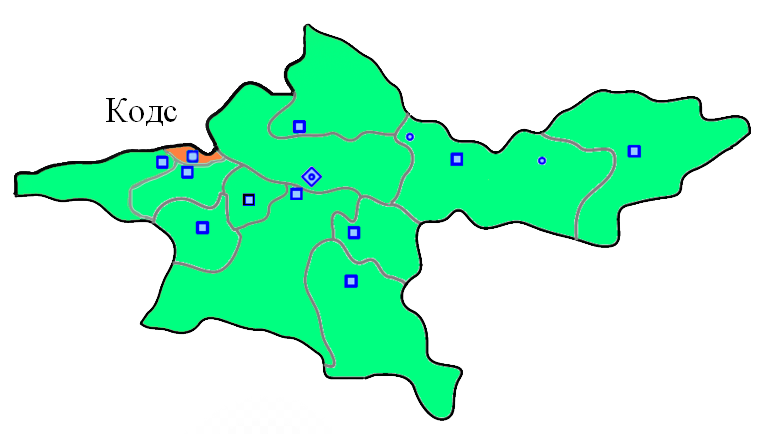 Шахрестан Кодс